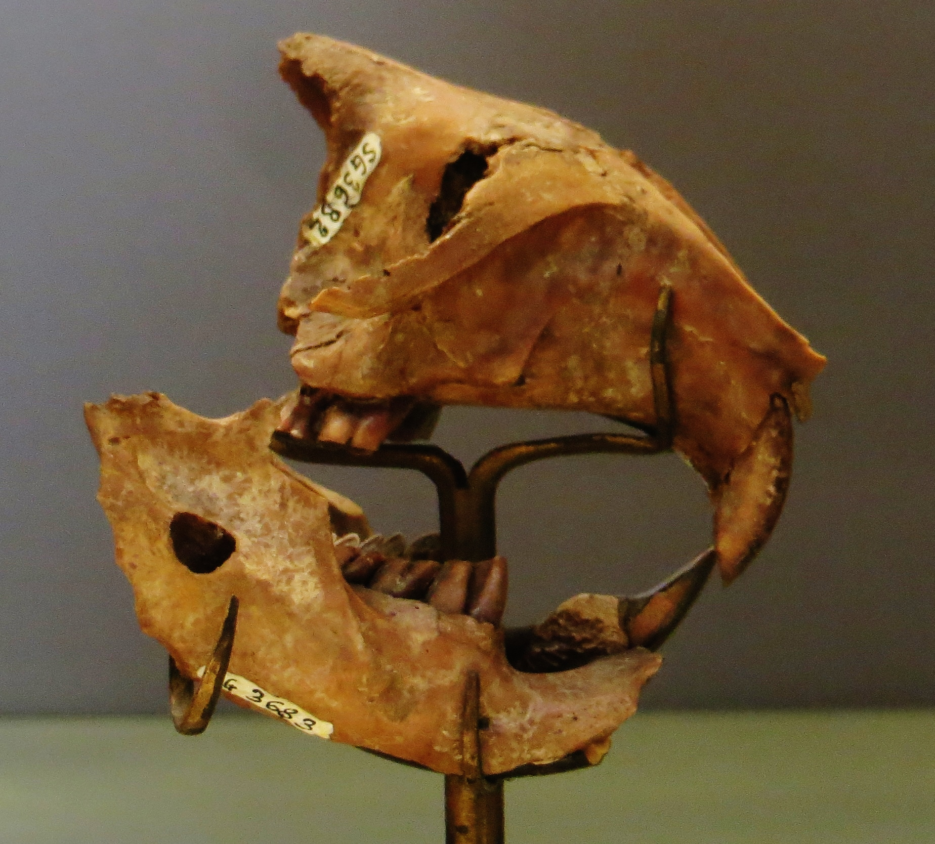 Fossil beaver